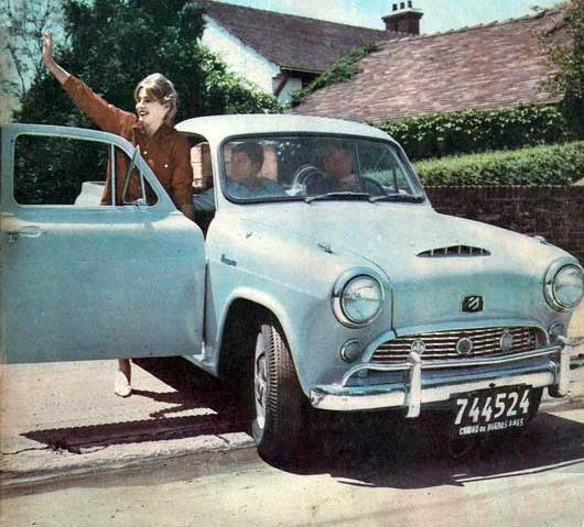 Es una foto de la pick up Siam Di Tella, la foto es del año 1962.